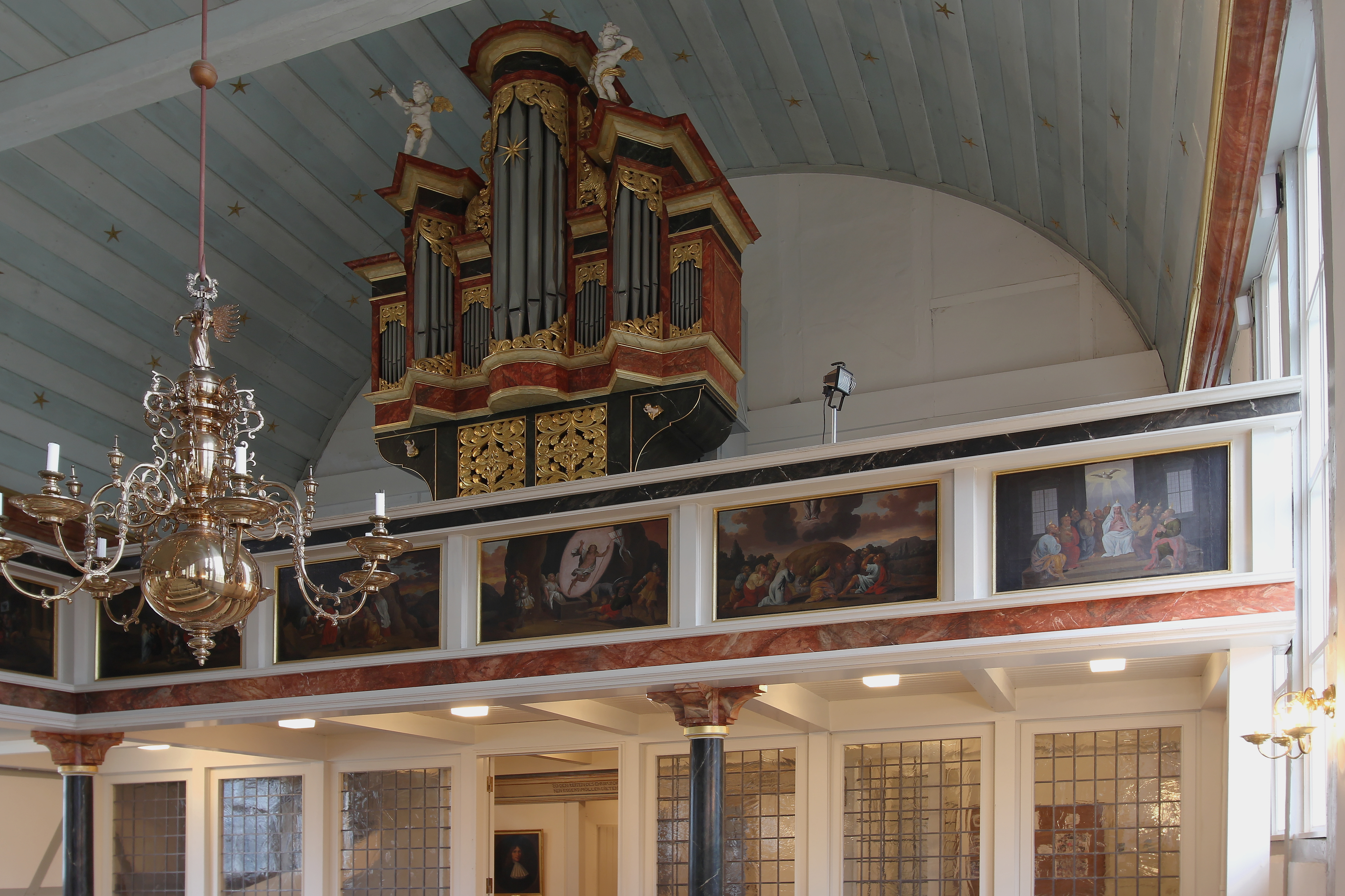 St. Nikolai, Hamburg-Moorfleet, Innenraum, Orgelempore